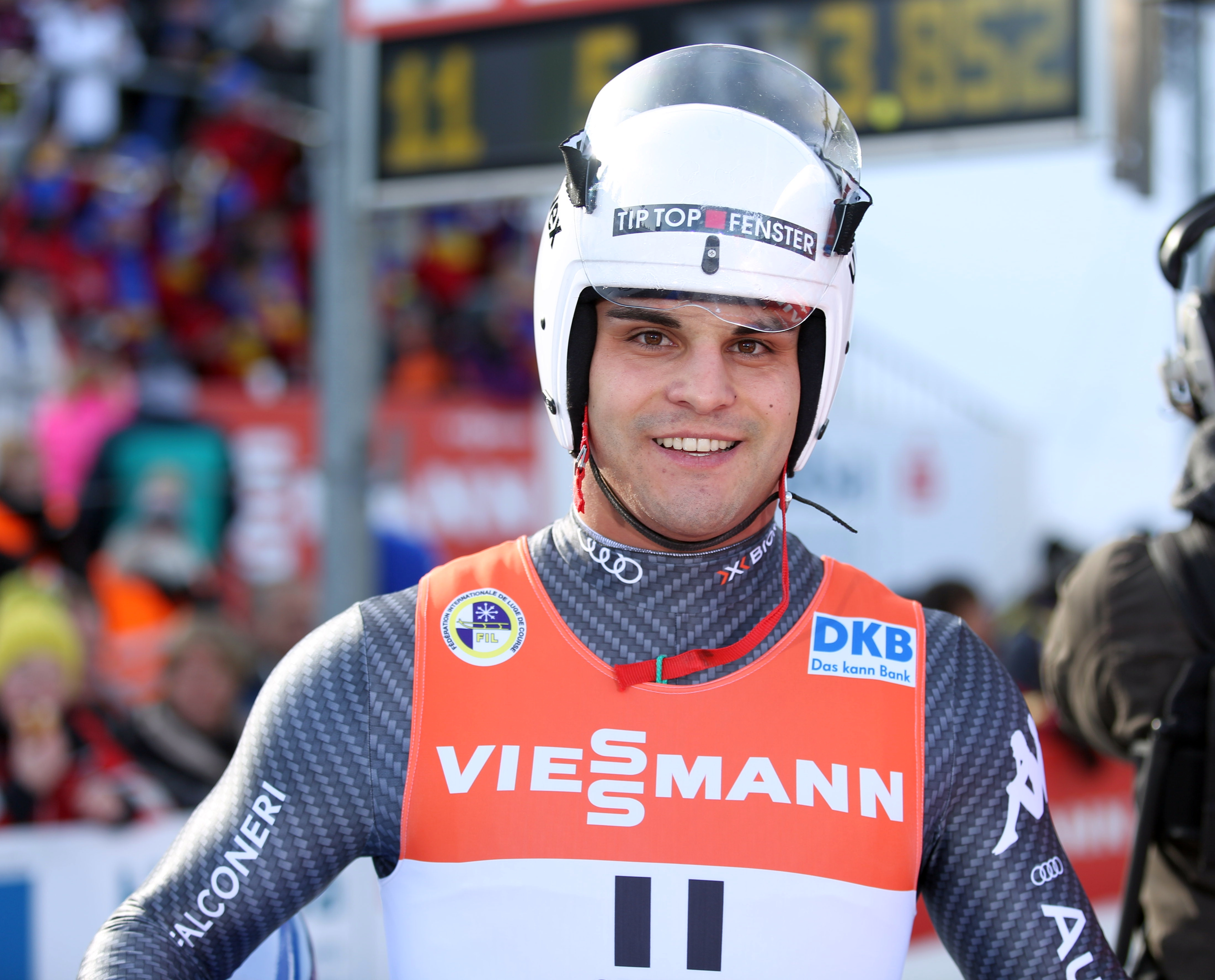 Emanuel Rieder beim Rennrodel-Weltcup der Herren in Oberhof 2017